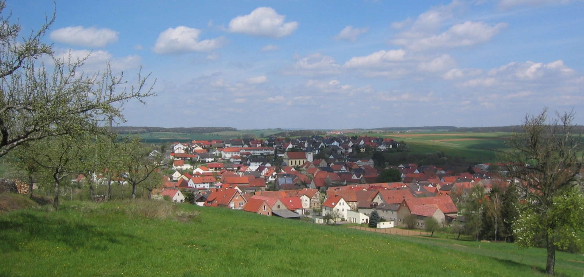 Schwebenried (Bayern/Unterfranken) aus südlicher Richtung)